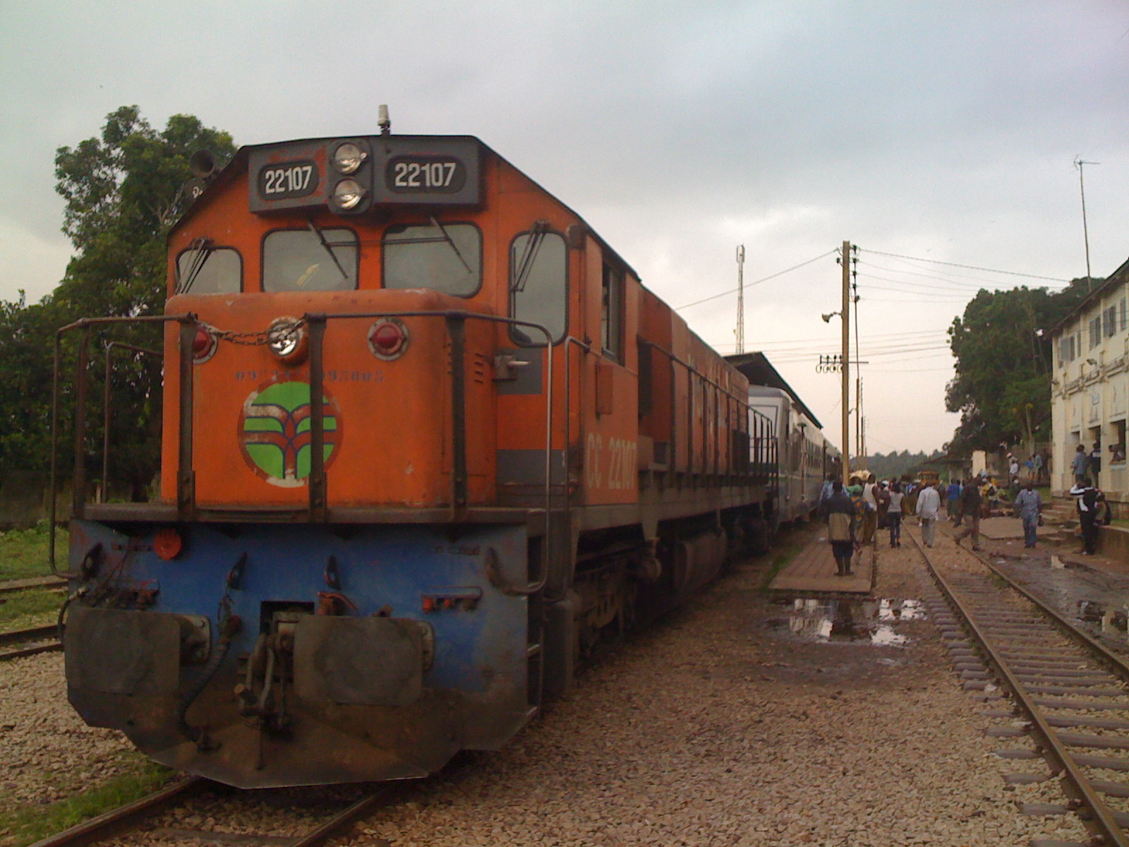 Locomotive de train voyageurs STIB (ex-sitarail), Côte d'Ivoire, Burkina Faso